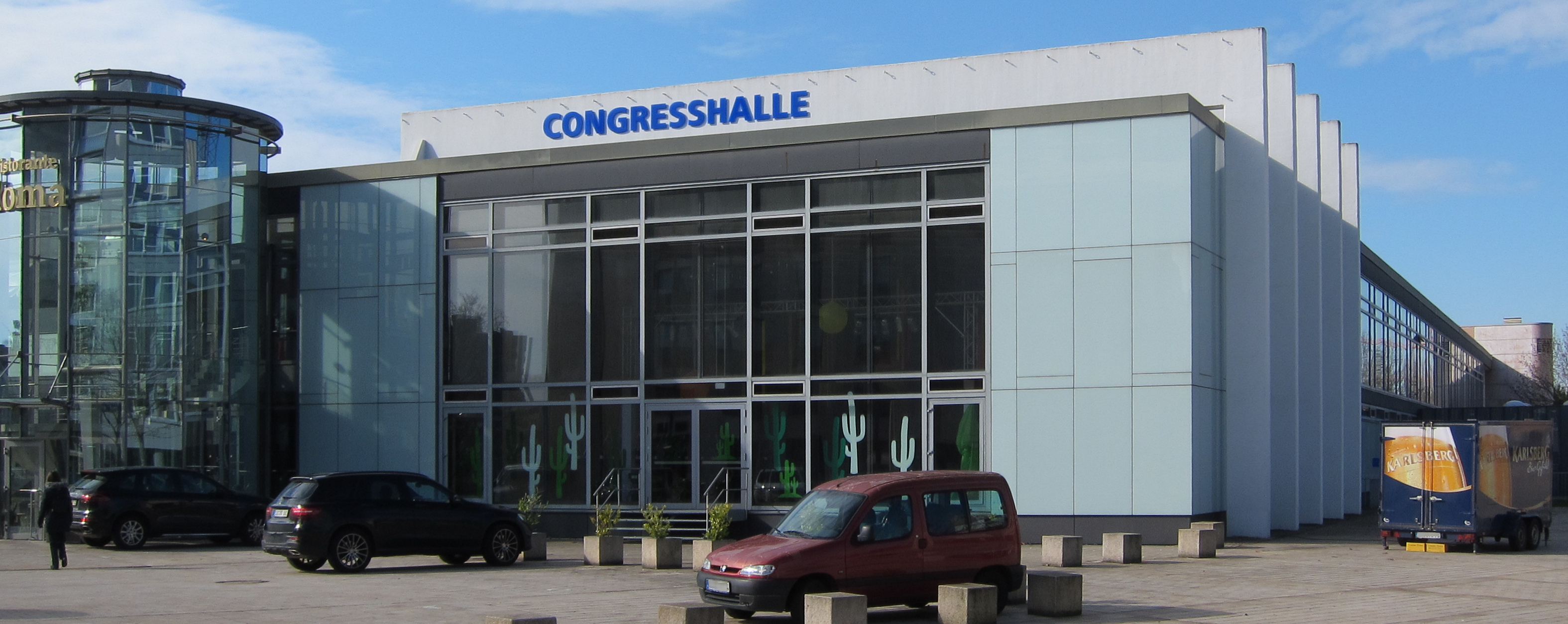 Congresshalle Saarbrücken (Ansicht von Osten)